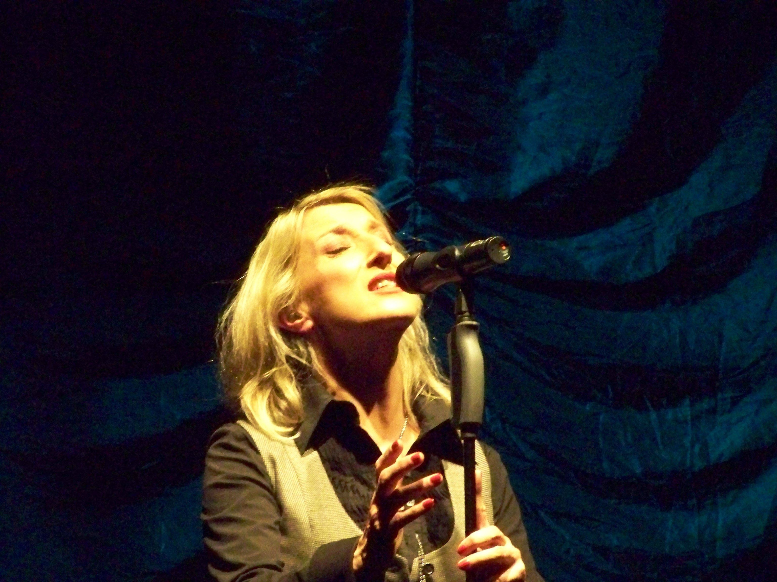 The german singer Claudia Brücken